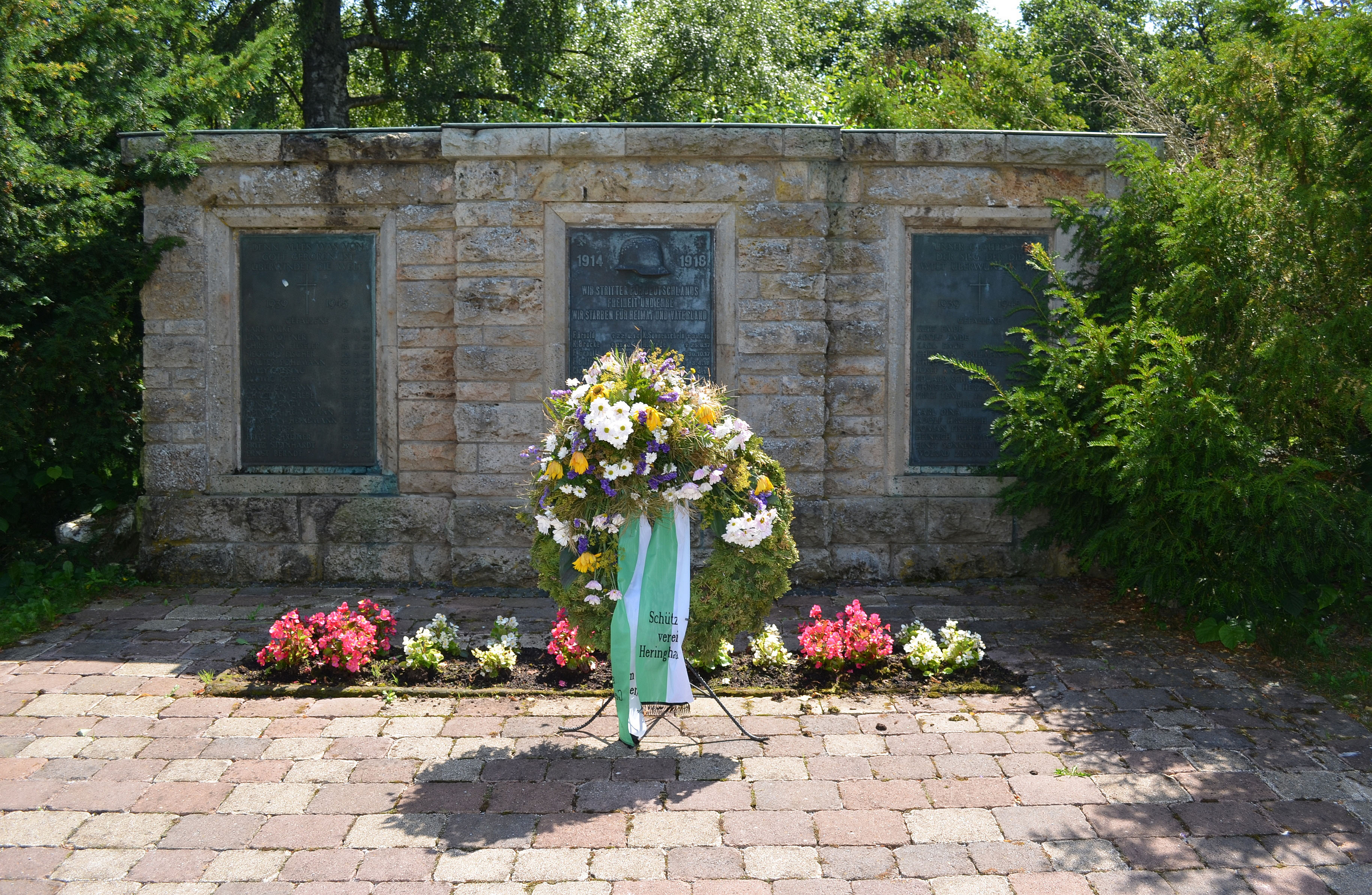 Heringhausen, Diemelsee, Kriegerdenkmal 2